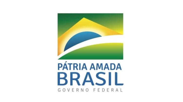 Logo do Governo do Bolsonaro do Brasil